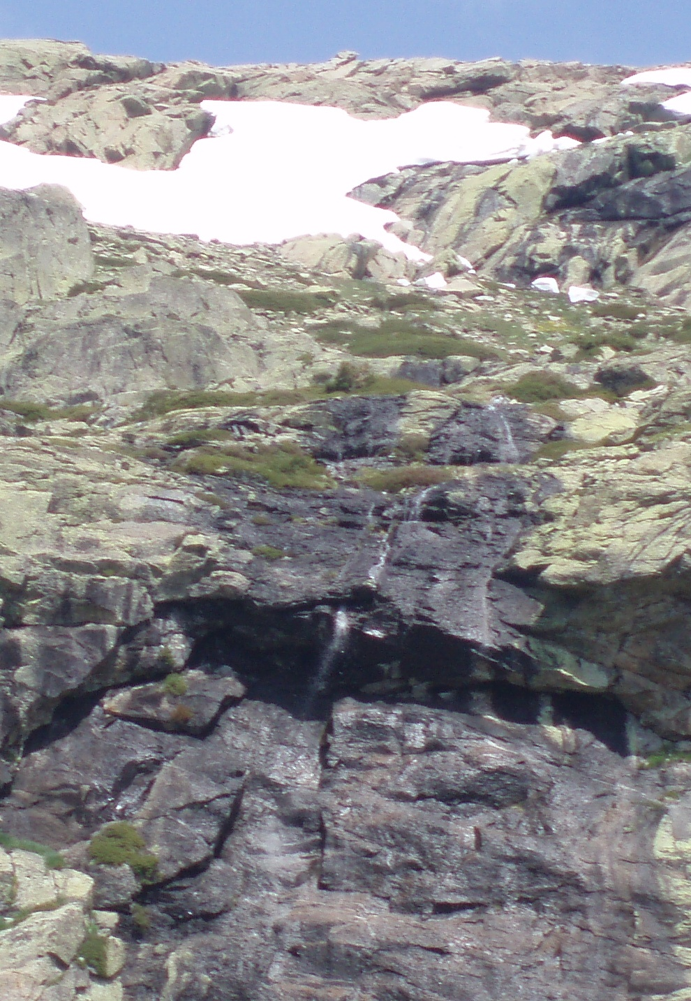 Una de las pequeñas cascadas que se forman en el circo de Peñalara (España) durante el deshielo.